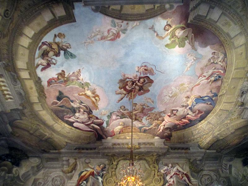 Deckengemälde in der Beletage